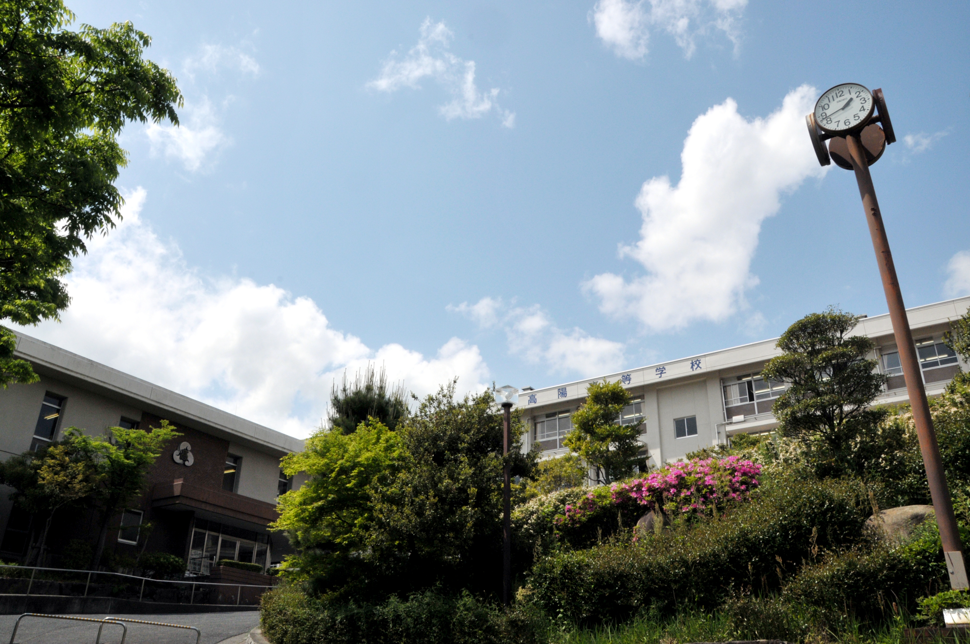 広島県立高陽高等学校外観